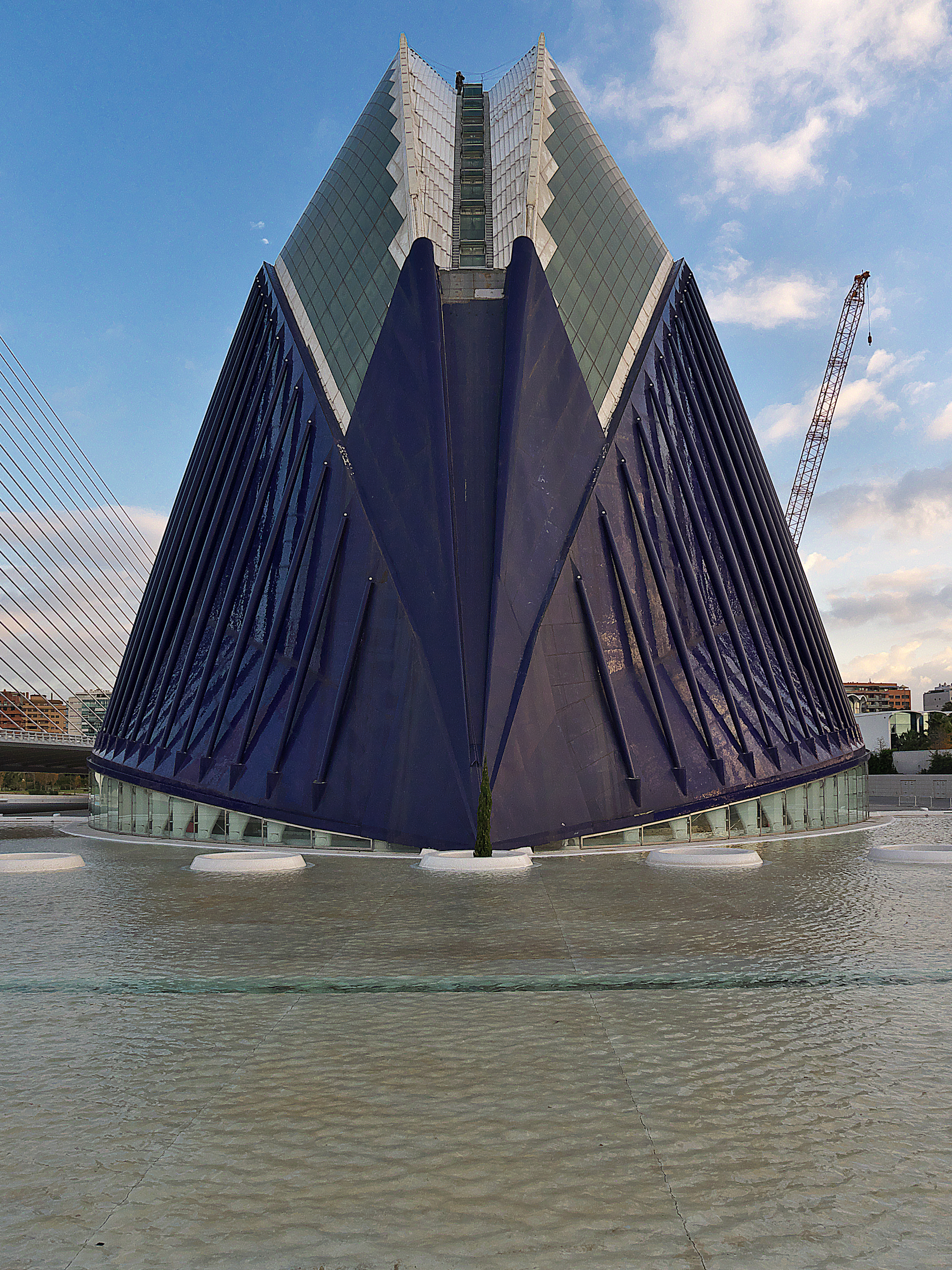 Ágora. Arquitectura de Santiago Calatrava (2009)